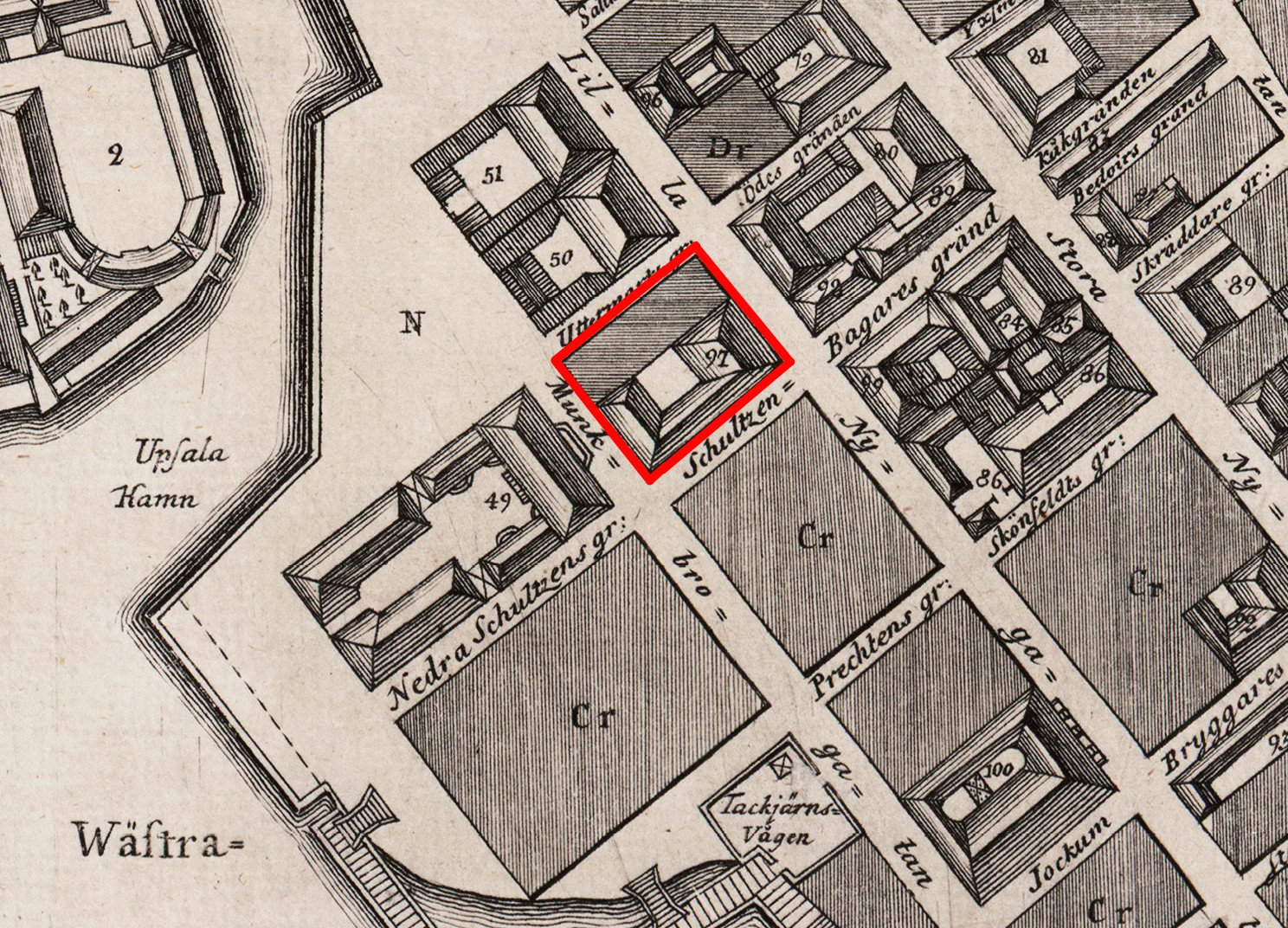 Grundritning över Stockholms stad nr. 1, del visande kv Penelope med "Kongl: General Post Contoiret".